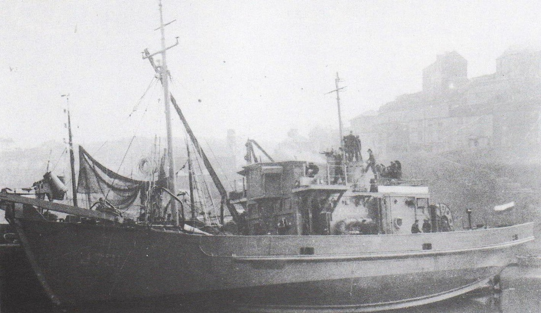 De Hr.Ms. Ameland afgemeerd.